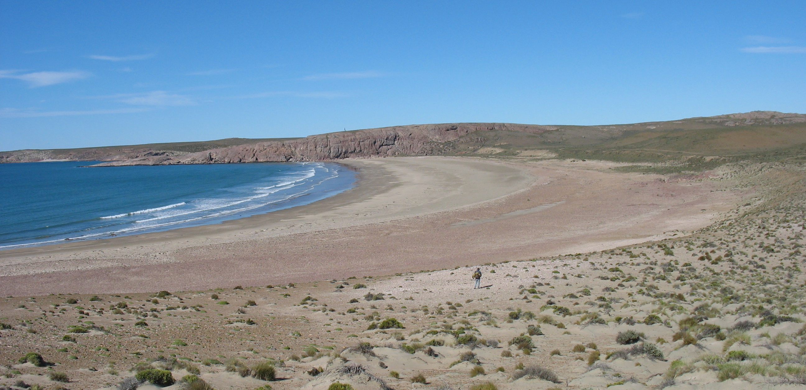 Playa de la bahía del Oso Marino en la provincia de Santa Cruz (Argentina).